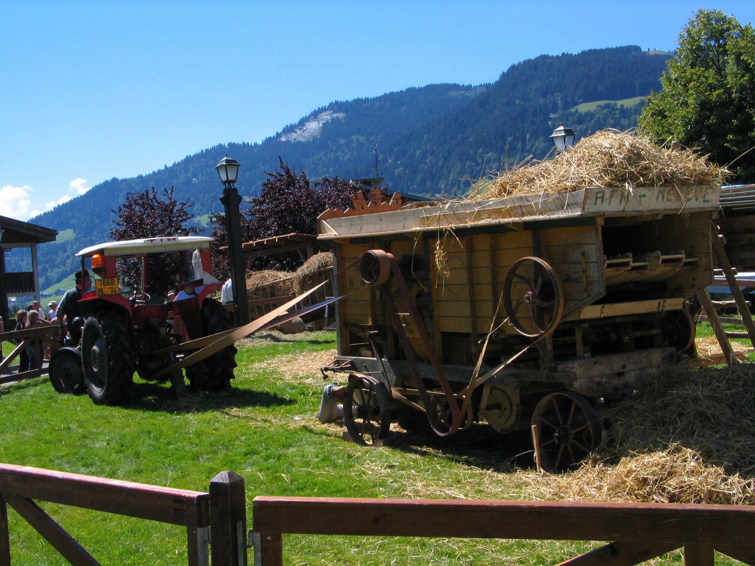 Megève, fête traditionnelle de l'été, la batteuse